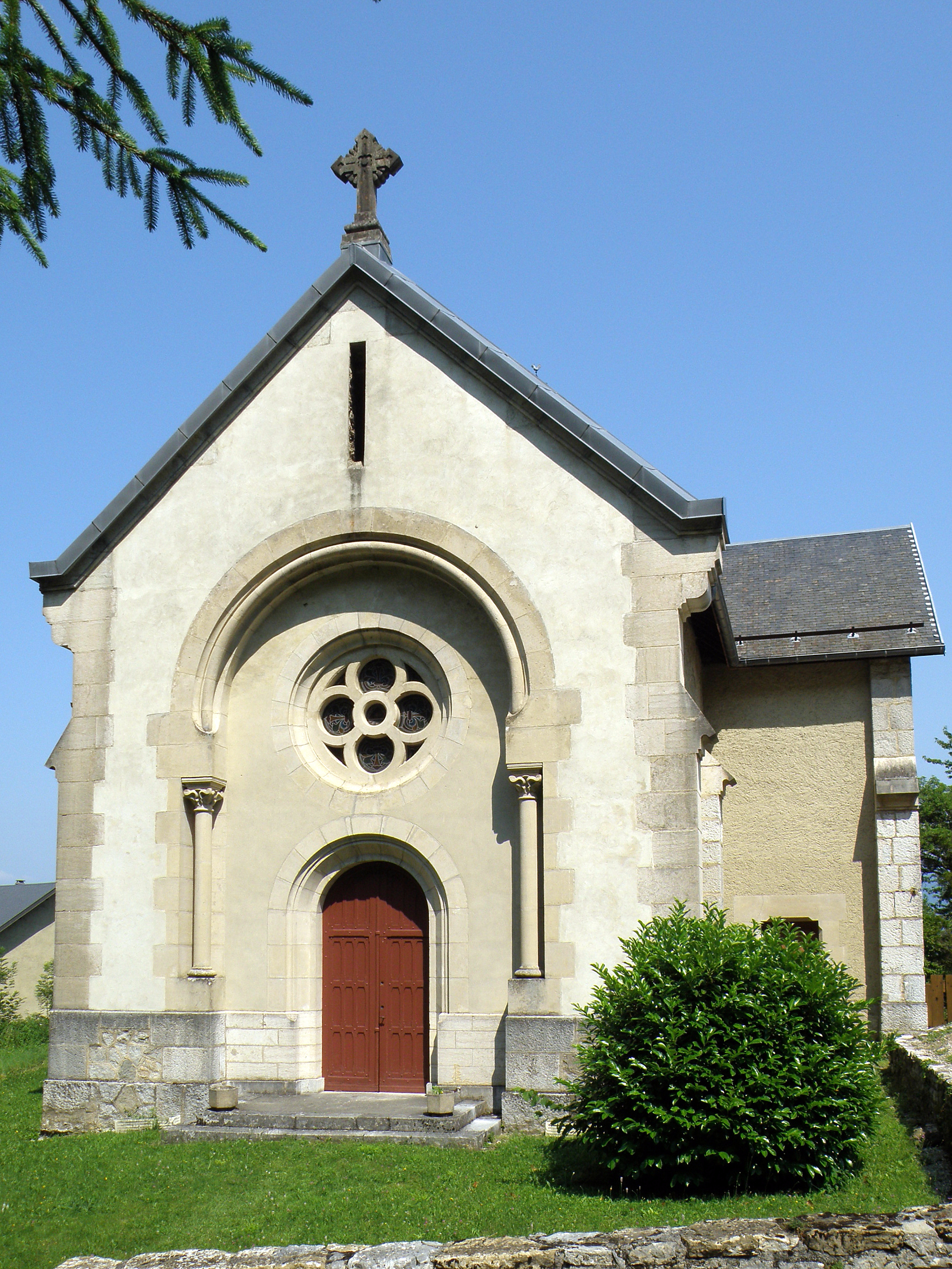 La Chapelle-du-Mont-du-Chat, comm. du département de la Savoie (région Rhône-Alpes, France), sur la rive occidentale du lac du Bourget. Église paroissiale Saint-Antoine.